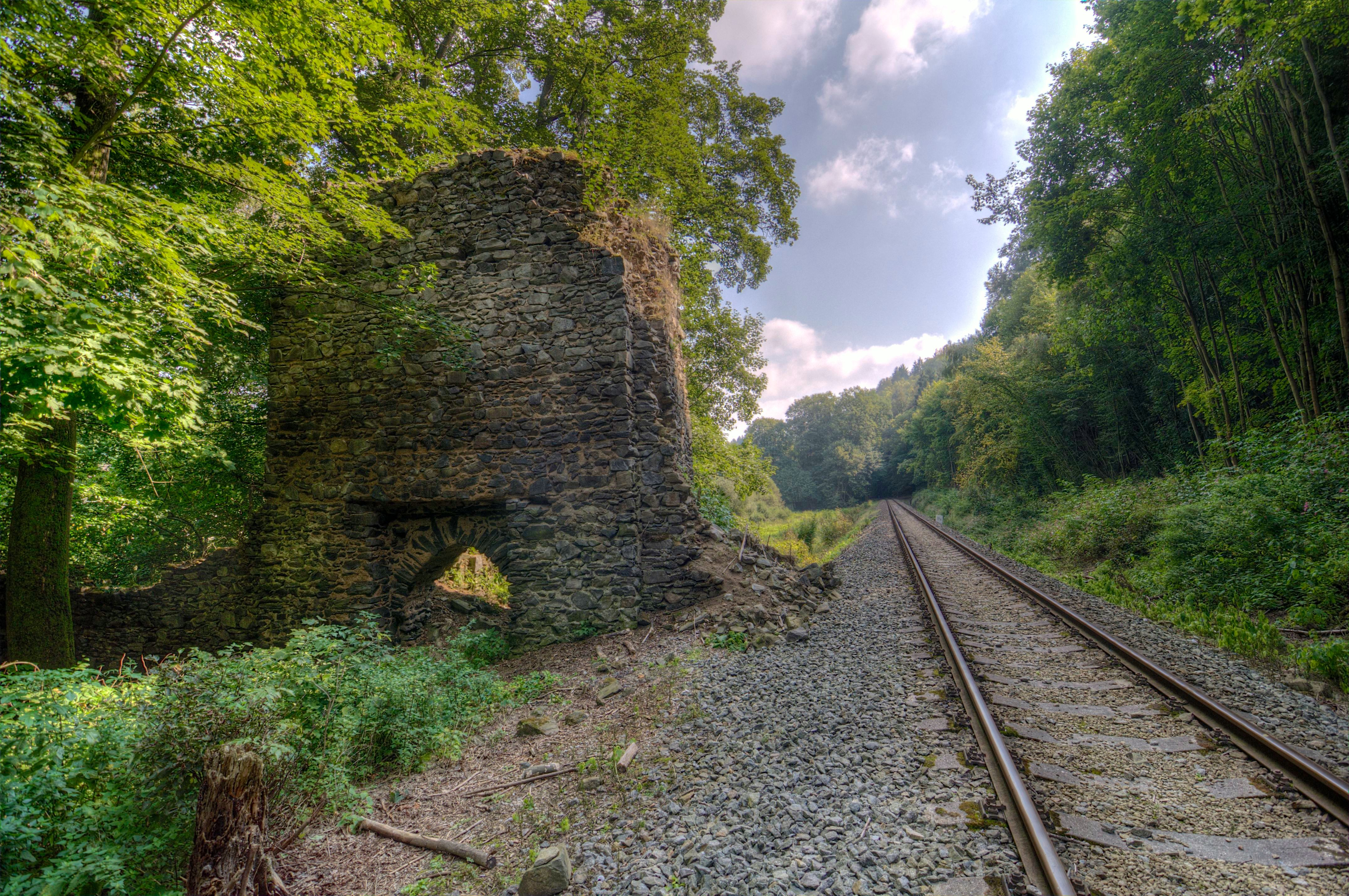 Stará Dubá / Odranec - Severozápadní branská věž podhradního městečka Odrance s železniční tratí